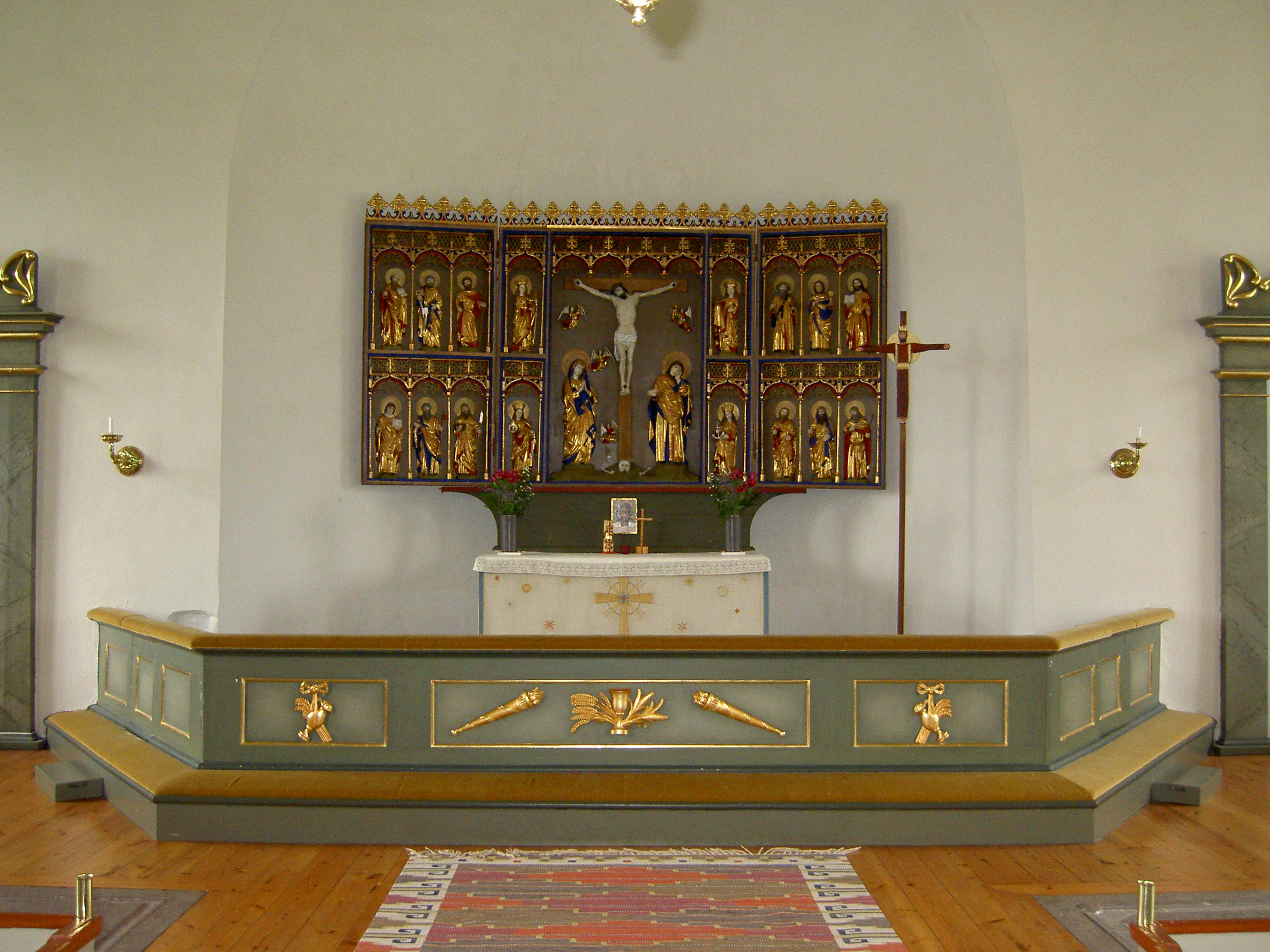 Altare i Rumskulla kyrka